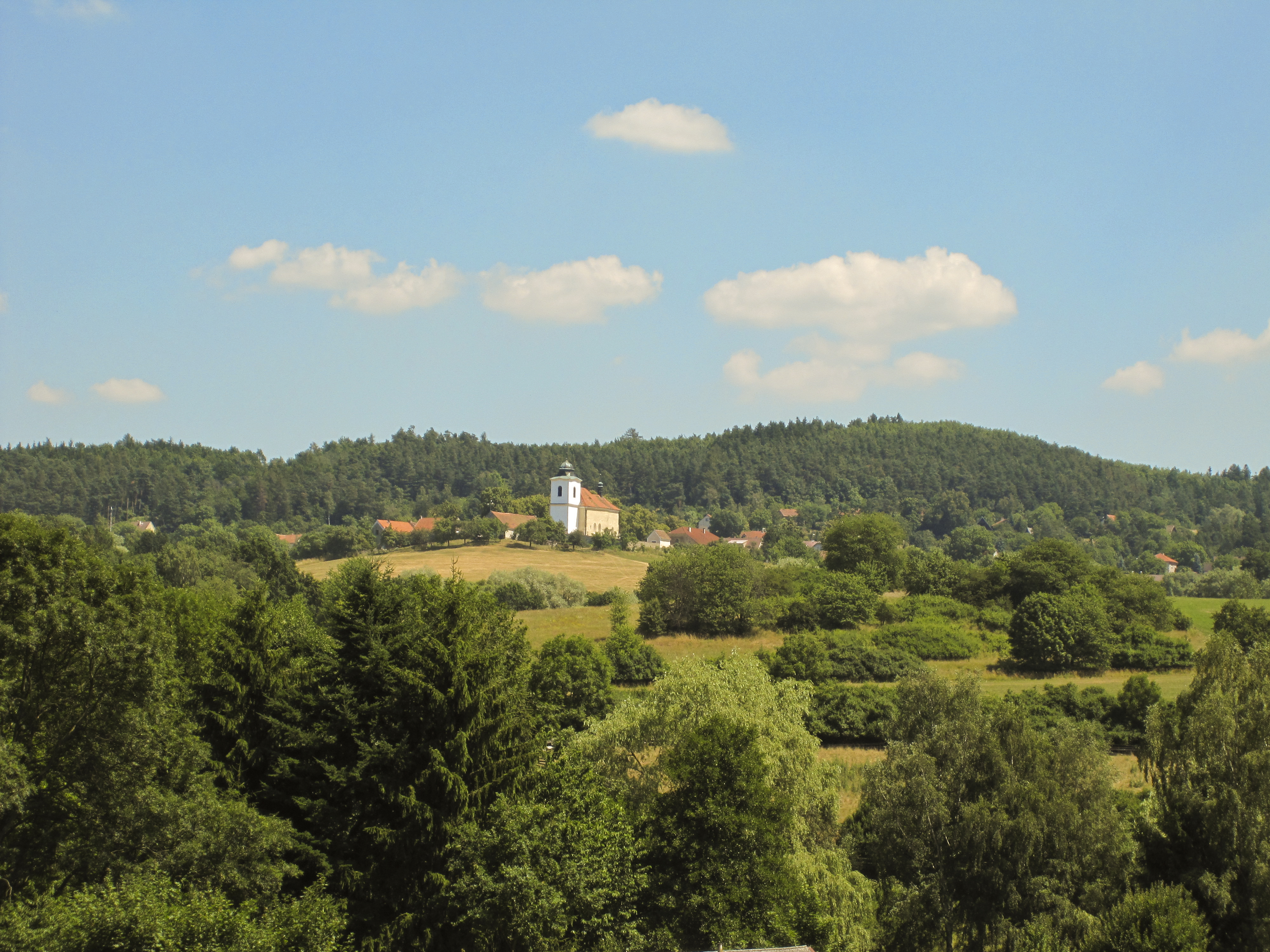 obec Vysoký Újezd (okres Benešov)